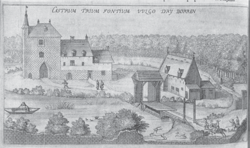 Kasteel Dry Borren of Drienborren in Oudergem. Afgebeeld in Chorographia Sacra Brabantiae van Antonius Sanderus, deel XXI (Brussel, 1659)